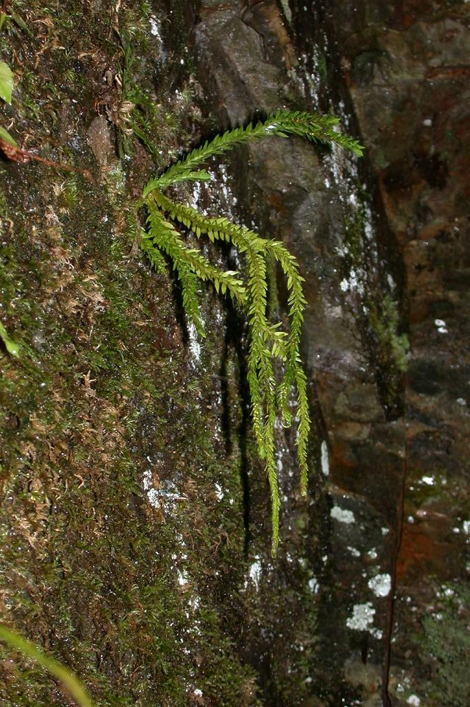 Huperzia fordii：ナンカクラン 2003/11/16 和歌山県： Wakayama Pref. Japan